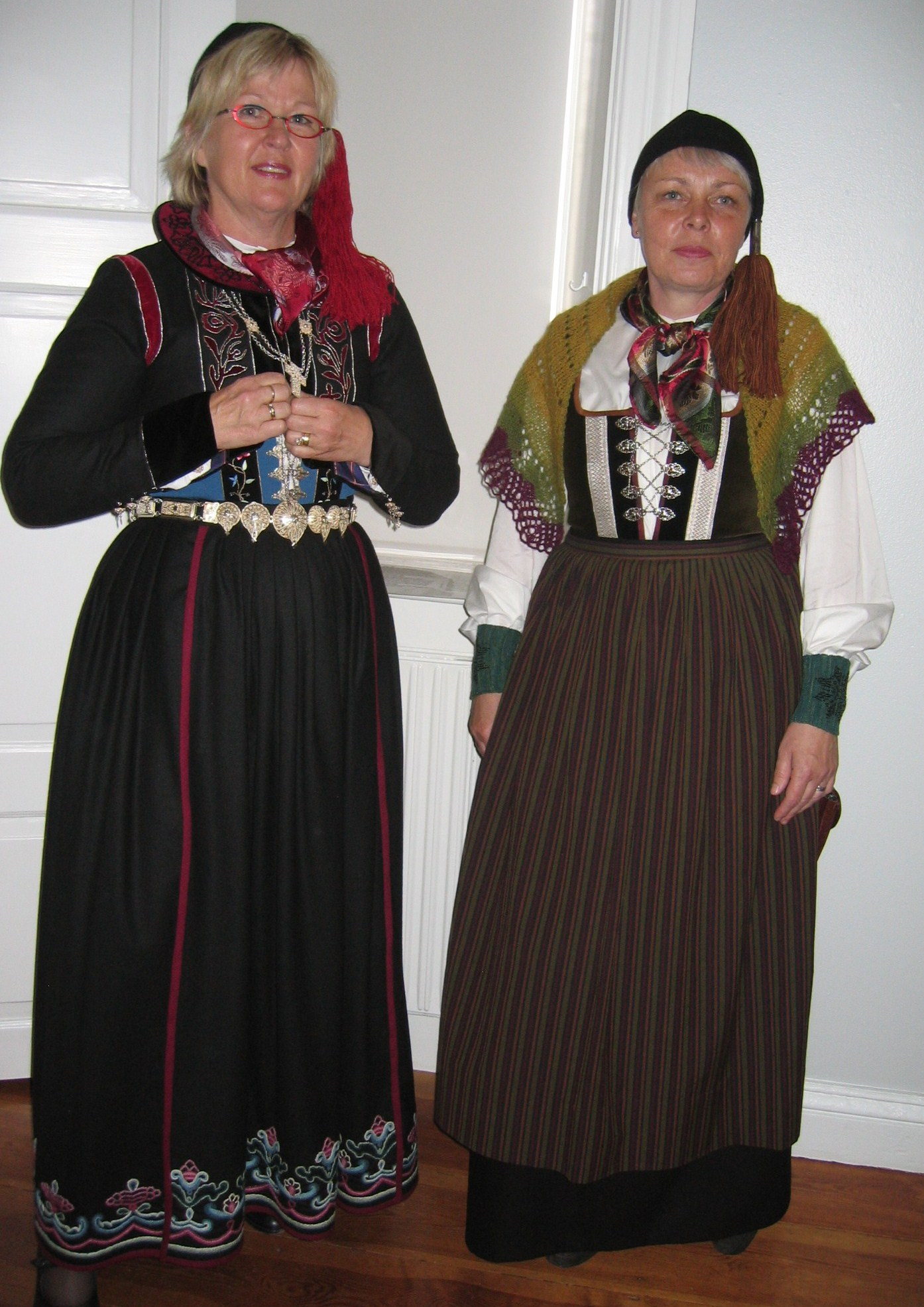 Félagskonur úr Faldafeyki sýna íslenska faldbúninginn á safnadegi í Árbæjarsafni í júlí 2008. Á myndinni sést undirklæðnaður undir faldbúninginn.